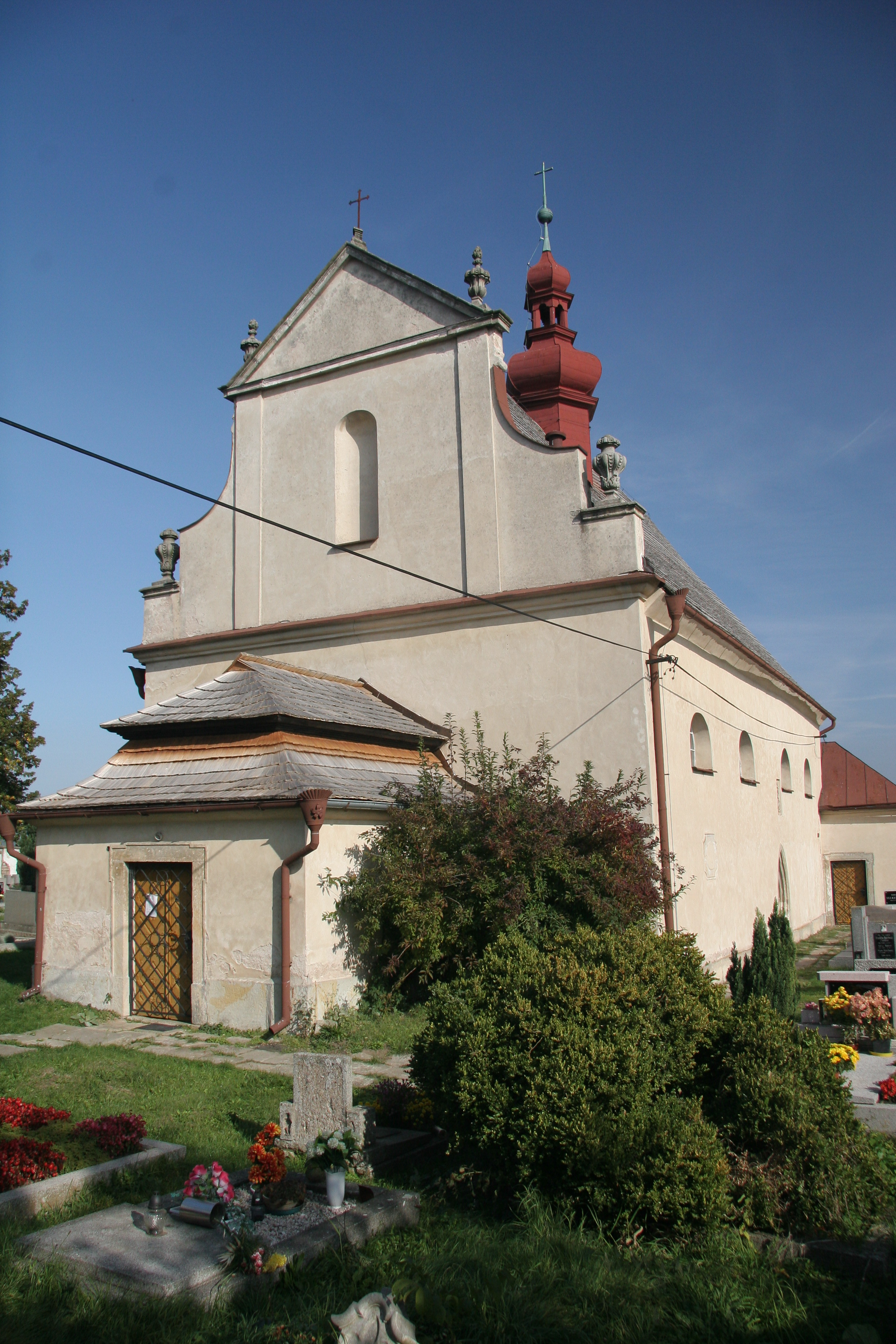 Kostel Nanebevzetí P. Marie (Chotěborky), V strana obce, na návrší, Chotěborky